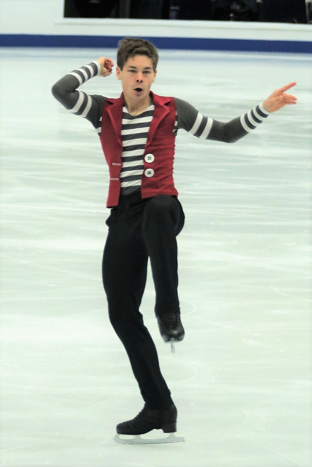 Валттер Виртанен (Финляндия) на Чемпионате Европы по фигурному катанию 2018.